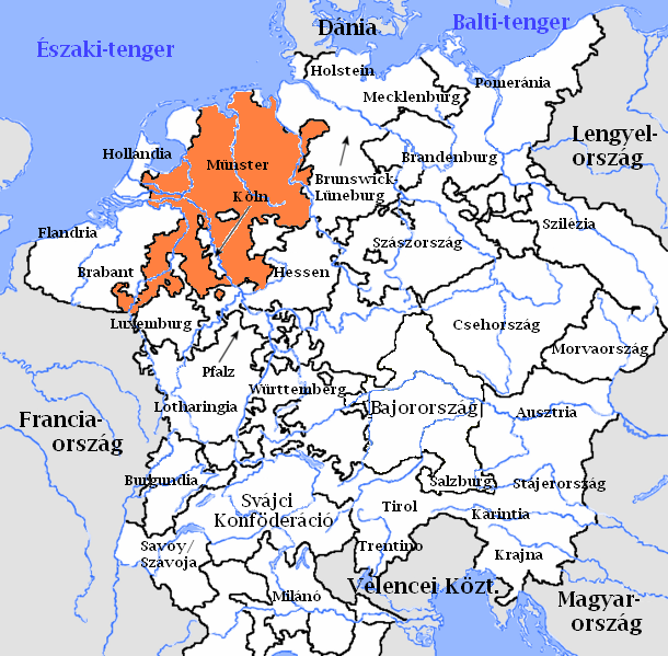 Az Alsó-rajna–vesztfáliai körzet a Német-római Birodalomban